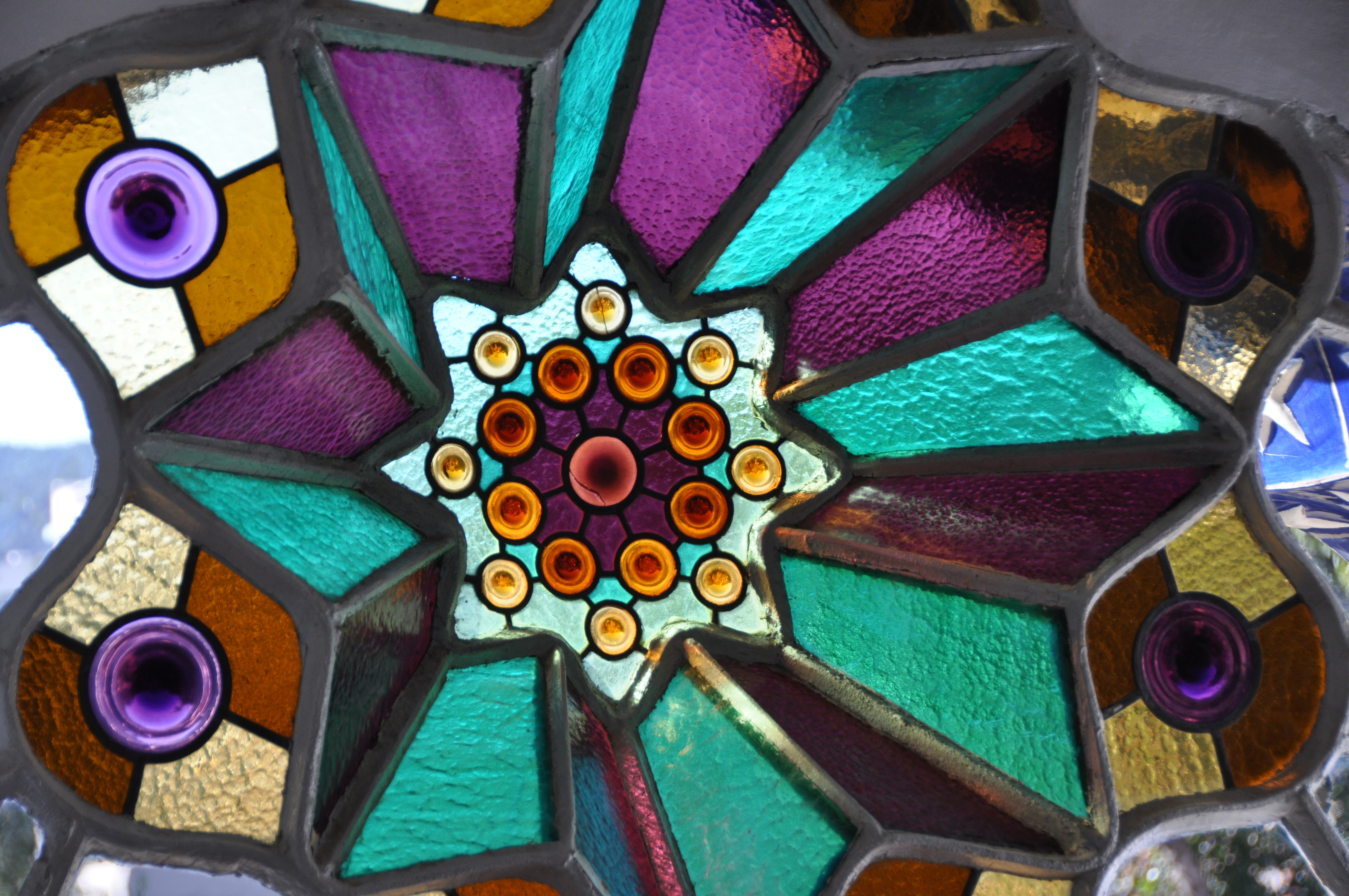 Barcelona, torre Bellesguard, d'Antoni Gaudí (1900-1909)